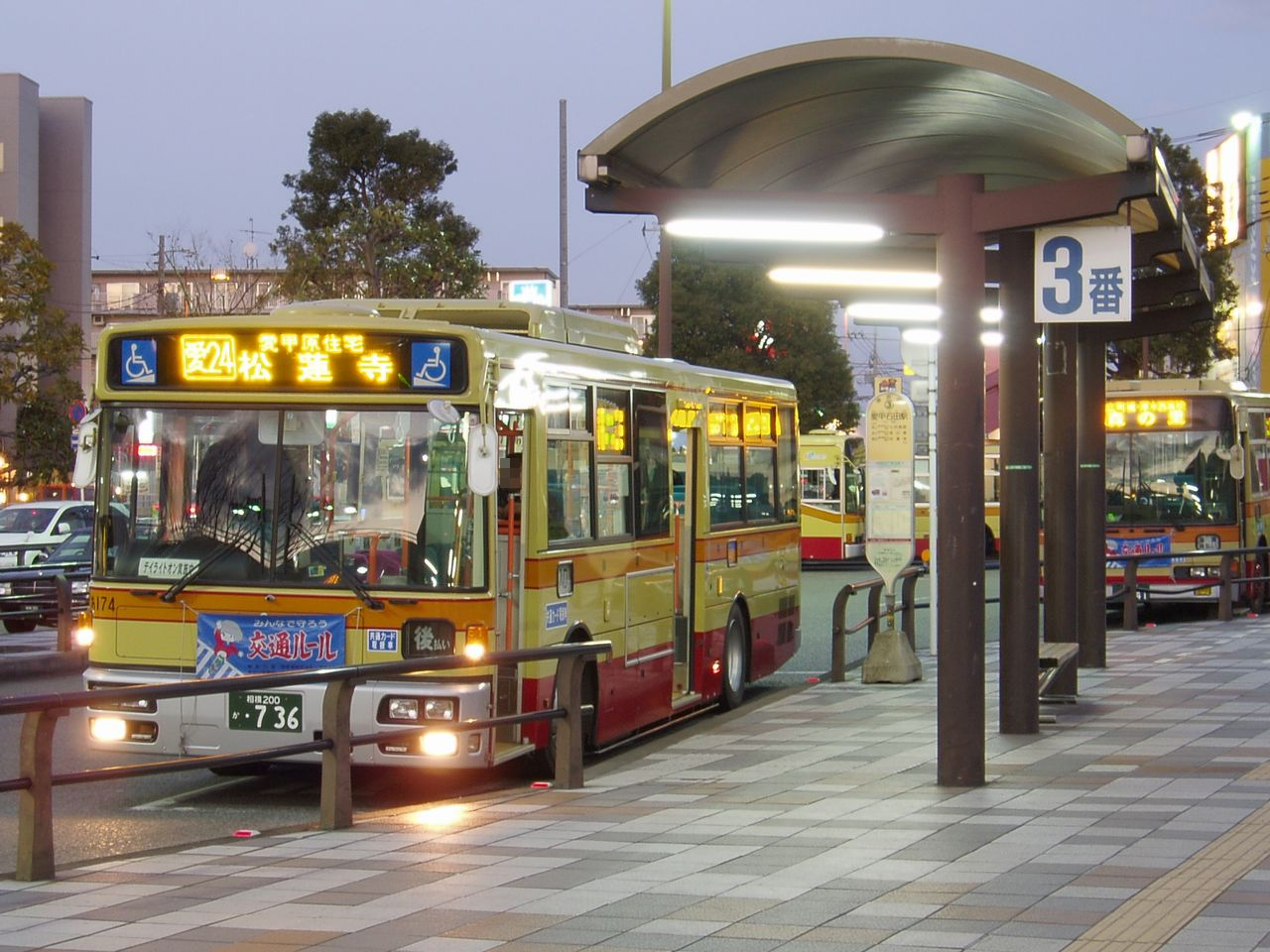 Kanachu A174（あ174） Nissan Diesel ADG-RA273MAN at Aikoishida Sta.